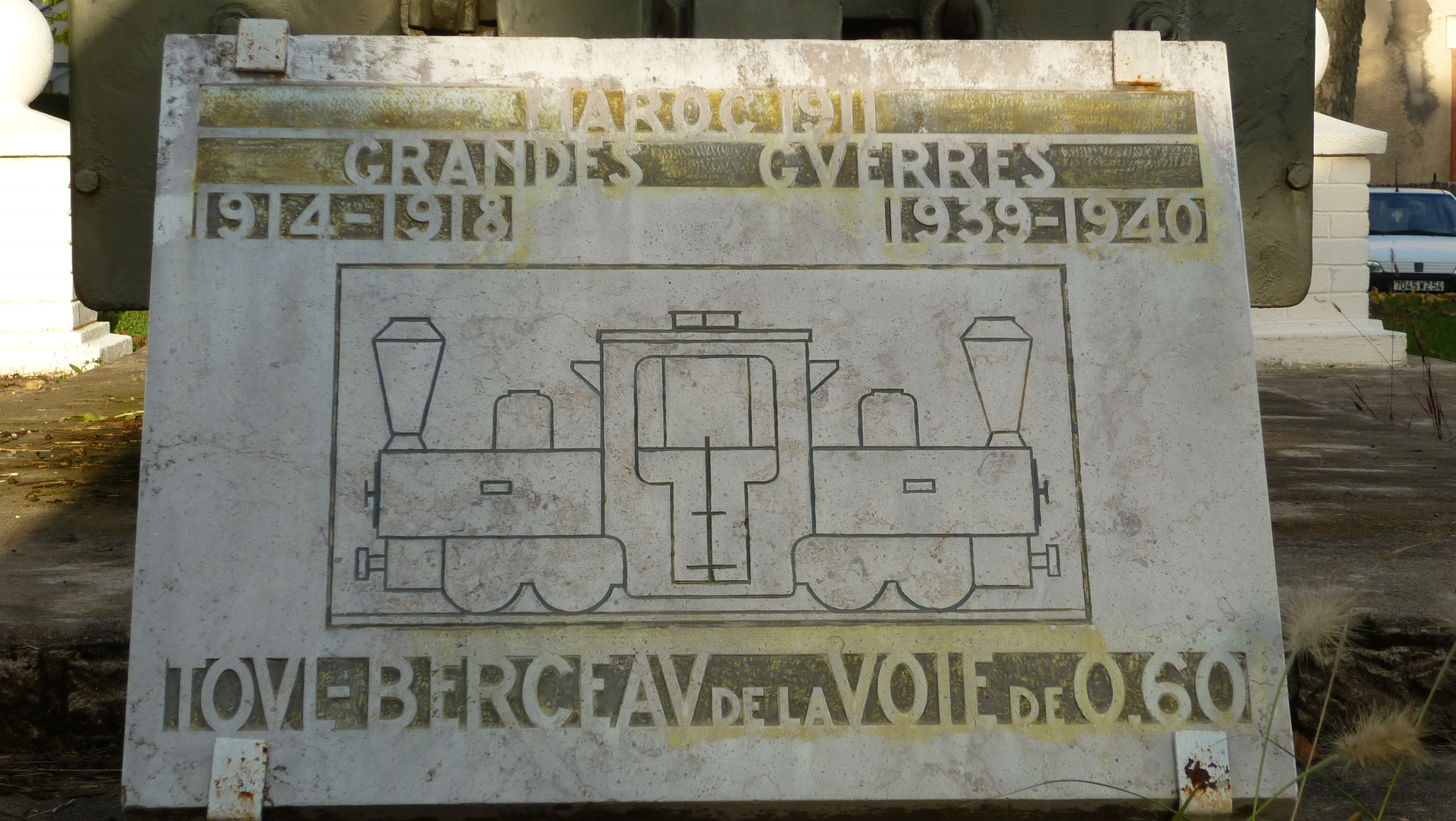 Plaque commemorative de la voie de 60 à Toul